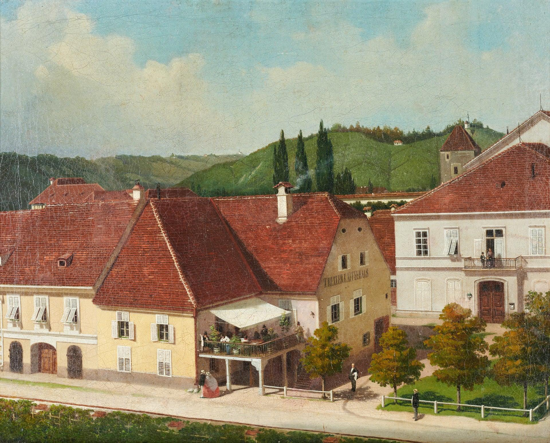 Staro gledališče v Mariboru.